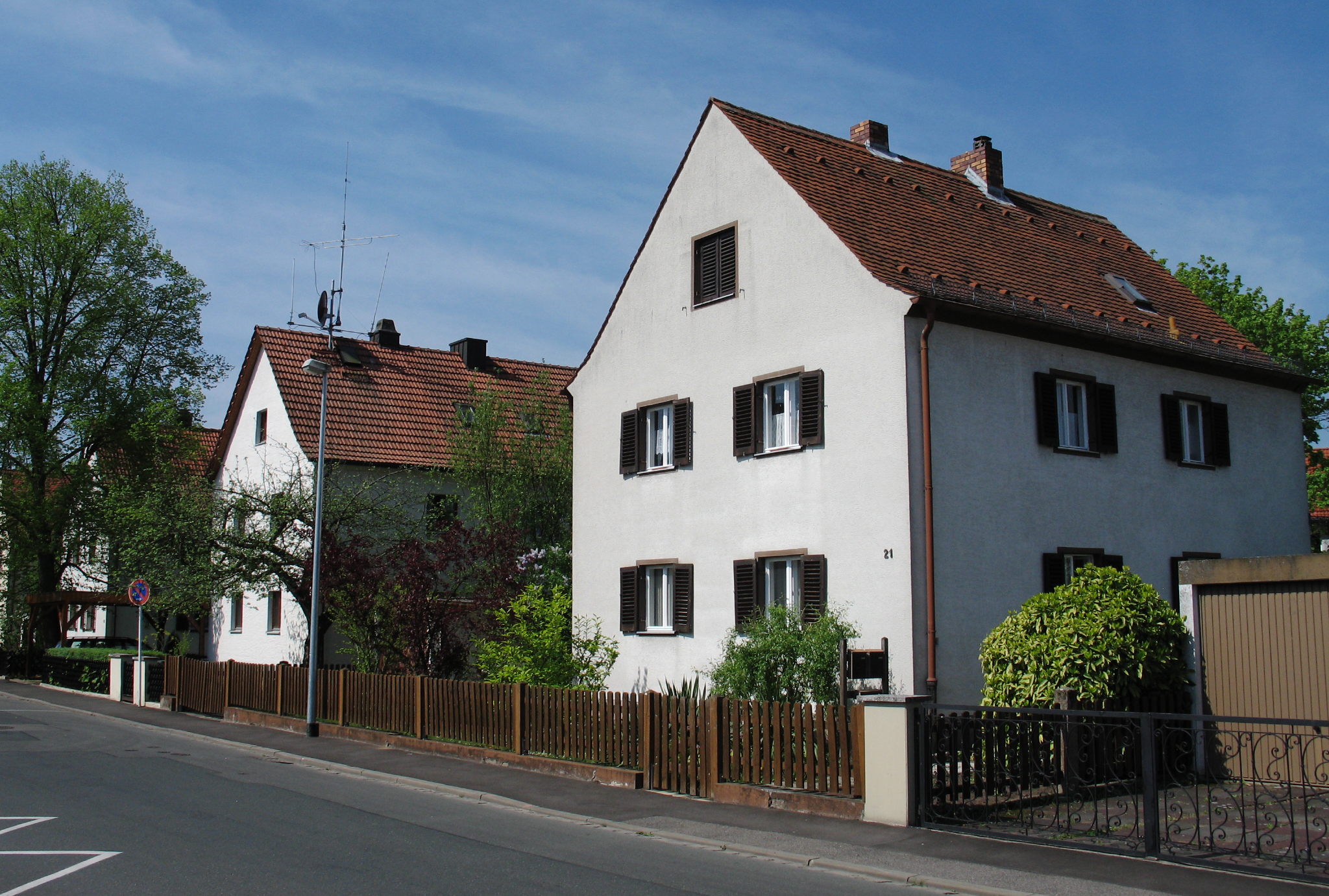 Bamberg-Gartenstadt, Siedlungshäuser Am Spinnseyer 19-21 (erbaut um 1935).